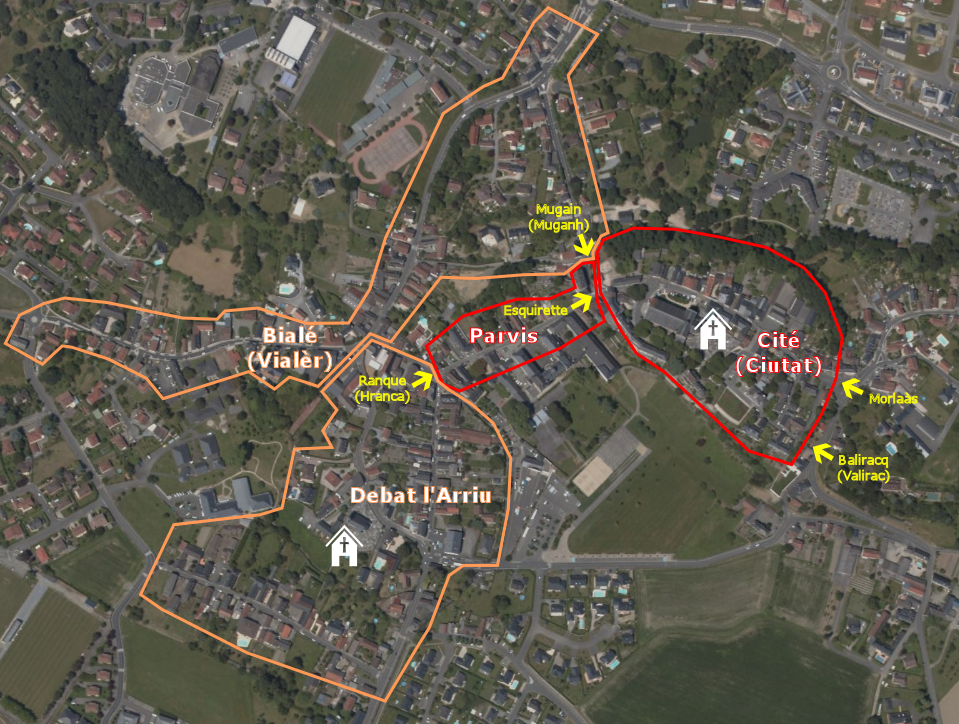 Les vics (quartiers) de Lescar décrient pas le terrier de 1643. Les flèches jaunes représentent les portes permettant l'accès aux deux vics fermés (Cité et Parvis). Les deux autres vics sont ouverts (en orange).